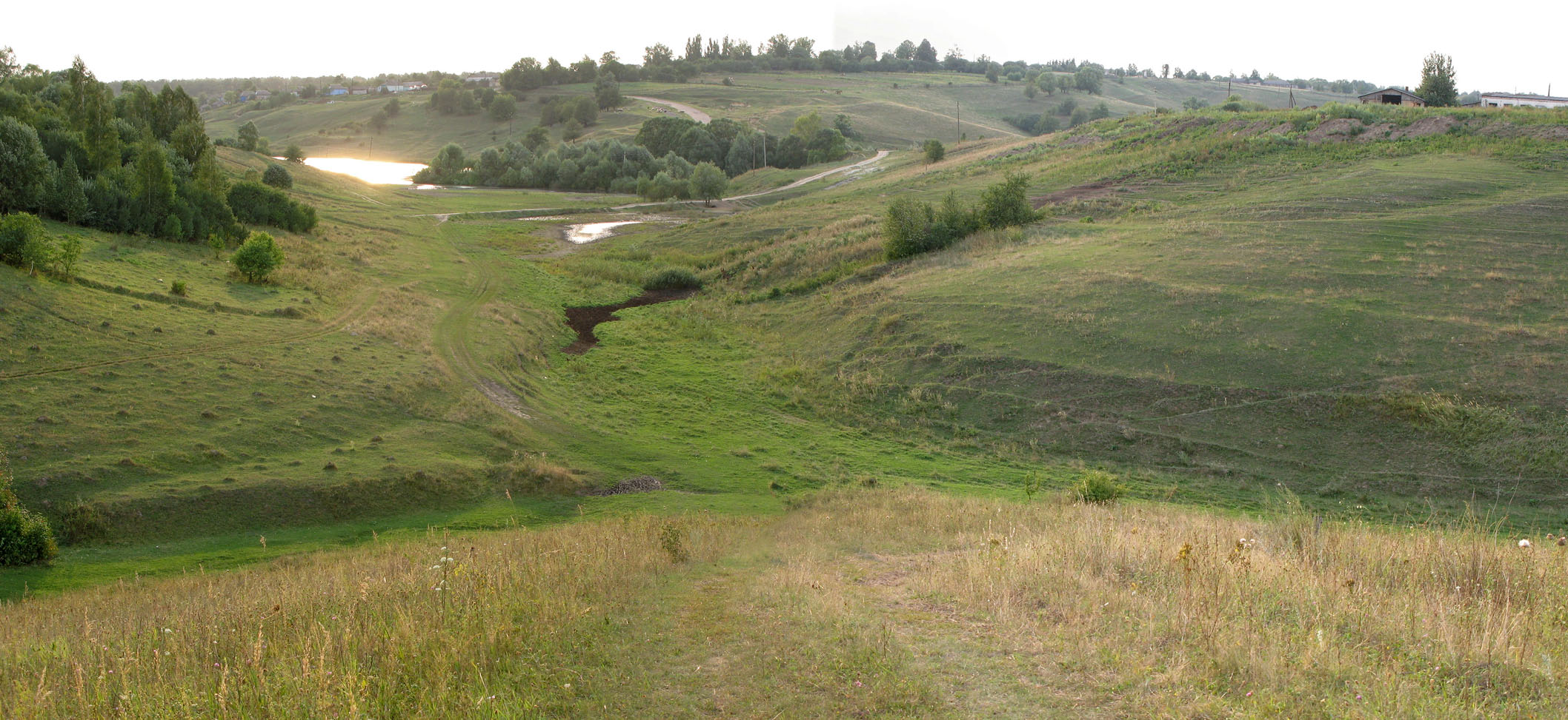 Maloye Gorod'kovo